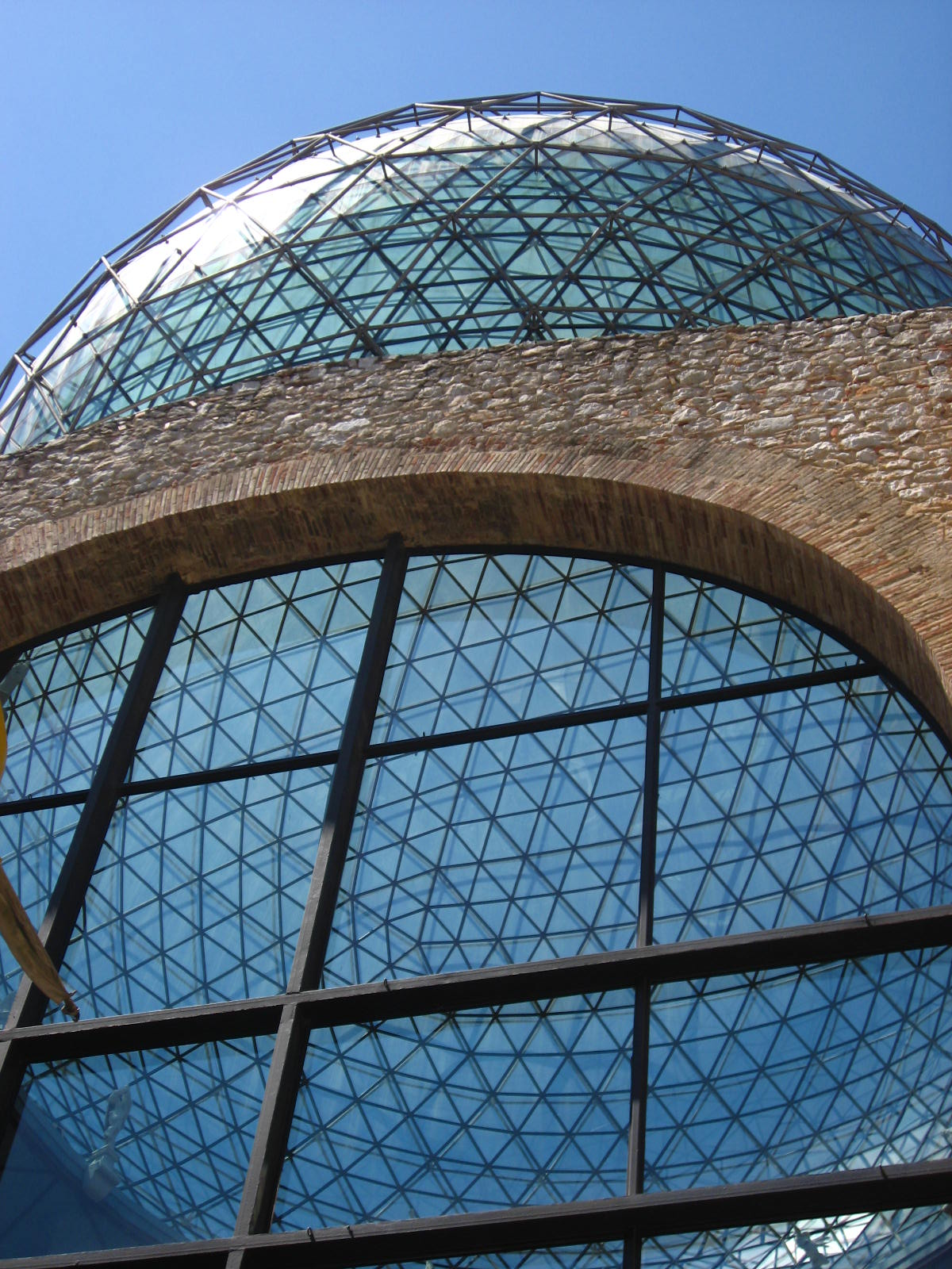 Fotografia de la cúpula geodèsica del museu Dalí de Figueres